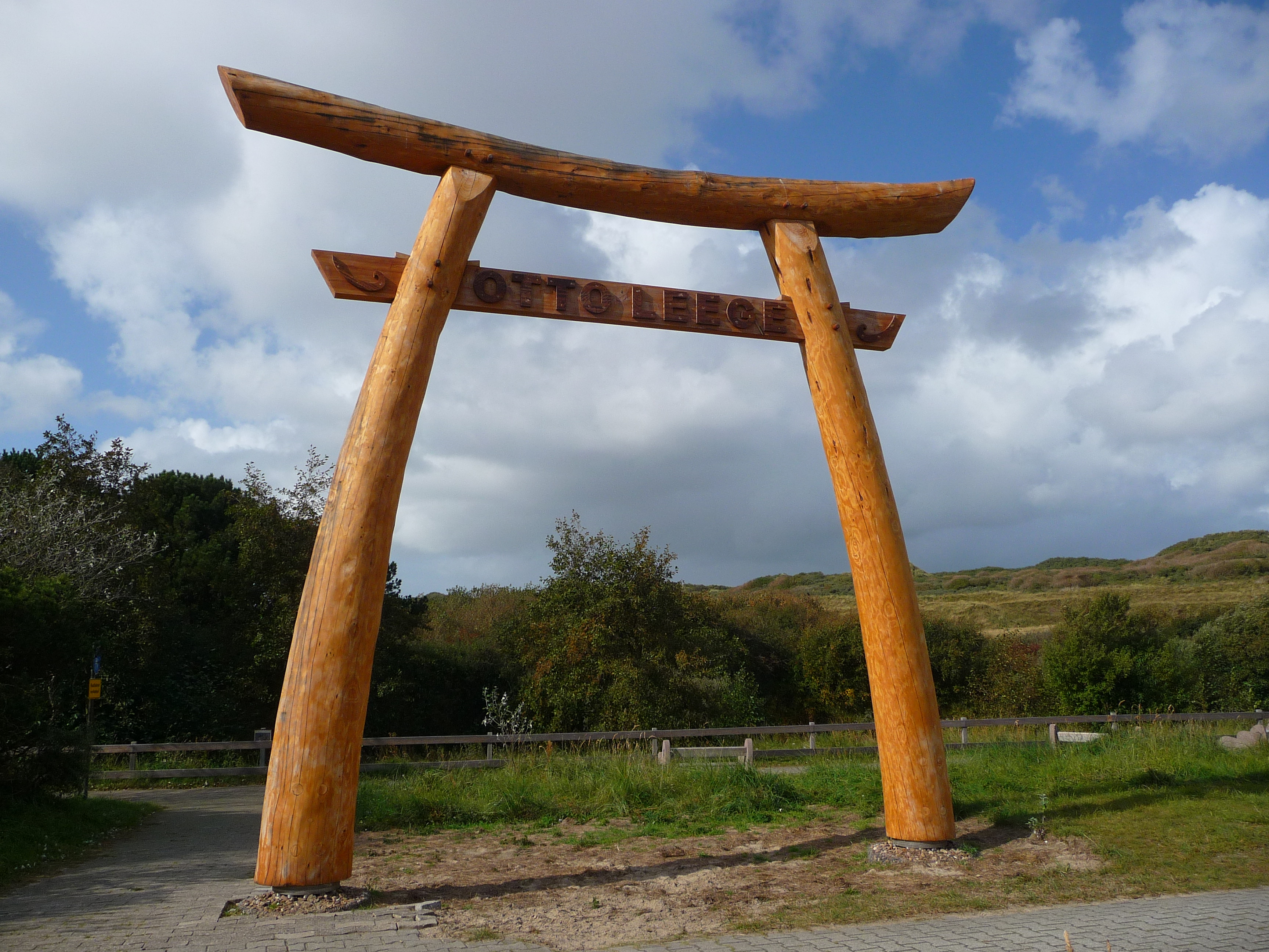 Otto-Leege-Tor auf der ostfriesischen Nordseeinsel Juist (Niedersachsen, Deutschland); gewidmet Otto Leege (1862-1951), deutscher Ornithologe, Tor nach den Entwürfen des Bildhauers Bernd F. K. Bunk